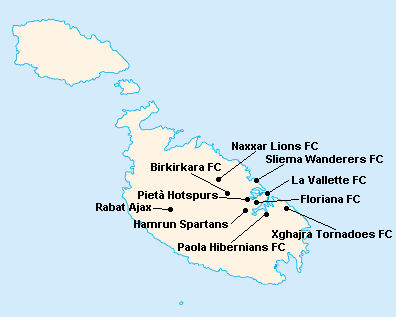 Répartition des clubs de Premier League Maltaise 2000-2001.